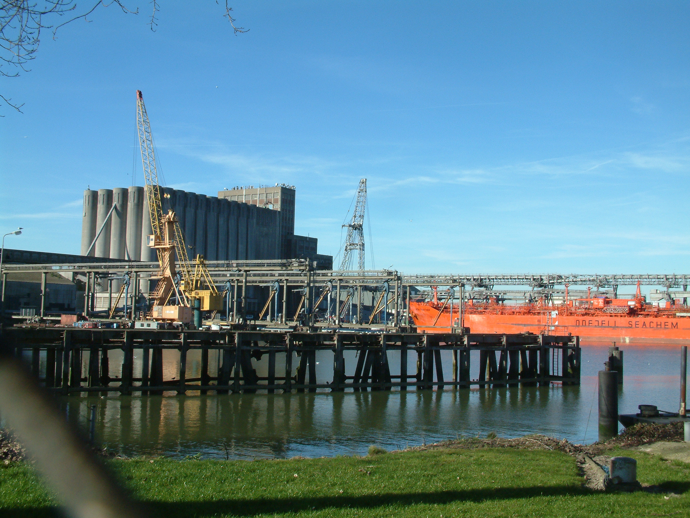 Gebouw van de Graan Elevator Maatschappij in de Botlek anno 2008, met de GEM pieren Categorie:Rotterdam